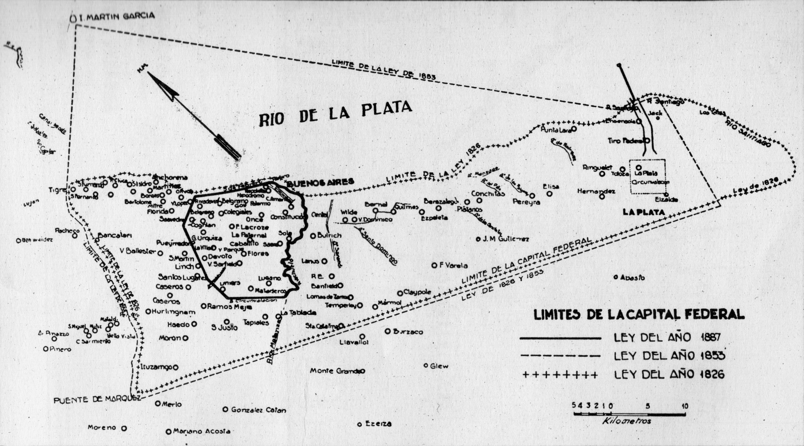 Plano donde se aprecian los límites del territorio comprendido en la ley de Capitalización de 1926 y la ley de Federalización de 1880 con reformas de 1884 y 1888. No se ha identificado la fuente de los límites correspondientes a 1853, aunque la ley orgánica municipal para la Ciudad de Buenos Aires sancionada por la Convención Nacional Constituyente ese año establecía una diferencia entre el territorio de la Municipalidad de Buenos Aires y "los demás pueblos comprendidos en el territorio de la Capital".